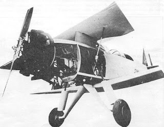 Jona J.6 particolare